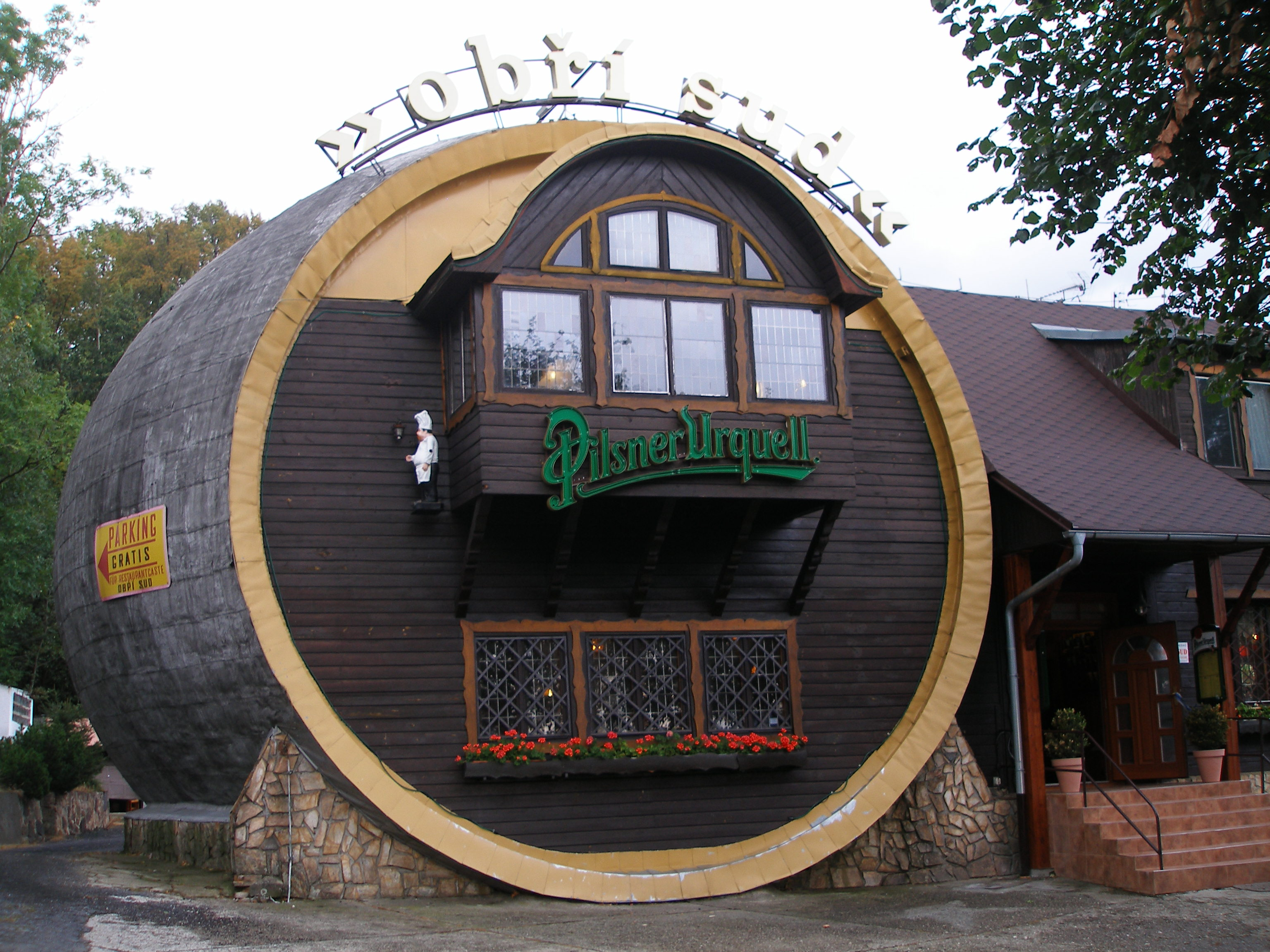 Obří sud, výletní restaurace u Lázní Libverdy, Jizerské hory, Česká republika